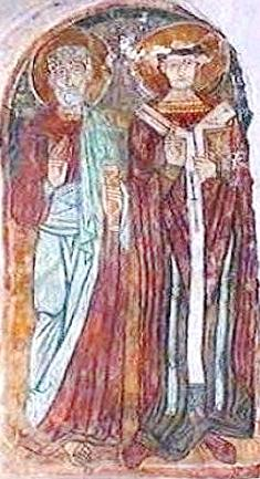 San Pietro Apostolo e San Leone Magno, fresco nella Chiesa Rupestre di San Nicola a Mottola